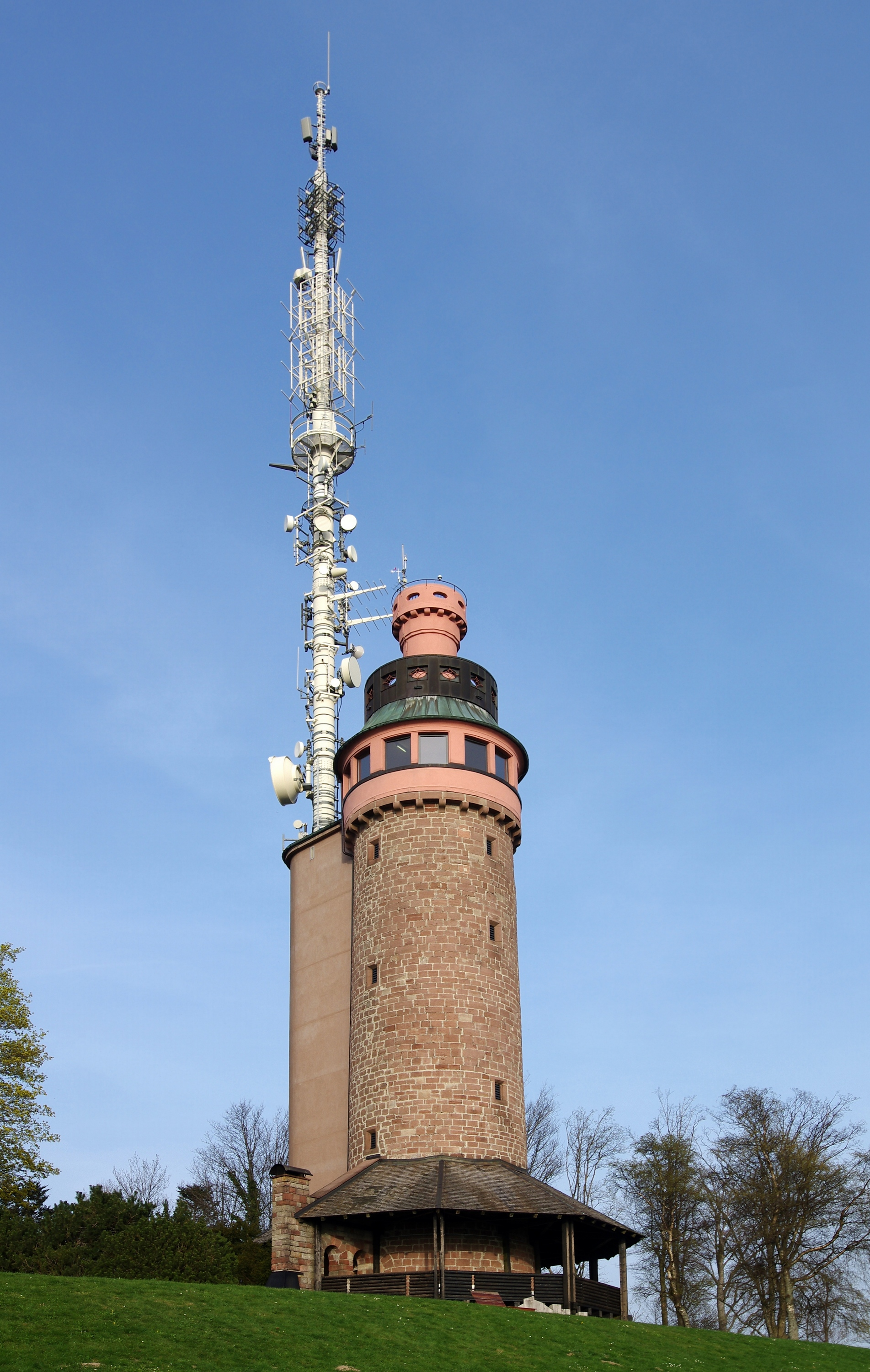 Der Aussichtsturm mit Sendeantenne auf dem Merkur bei Baden-Baden.